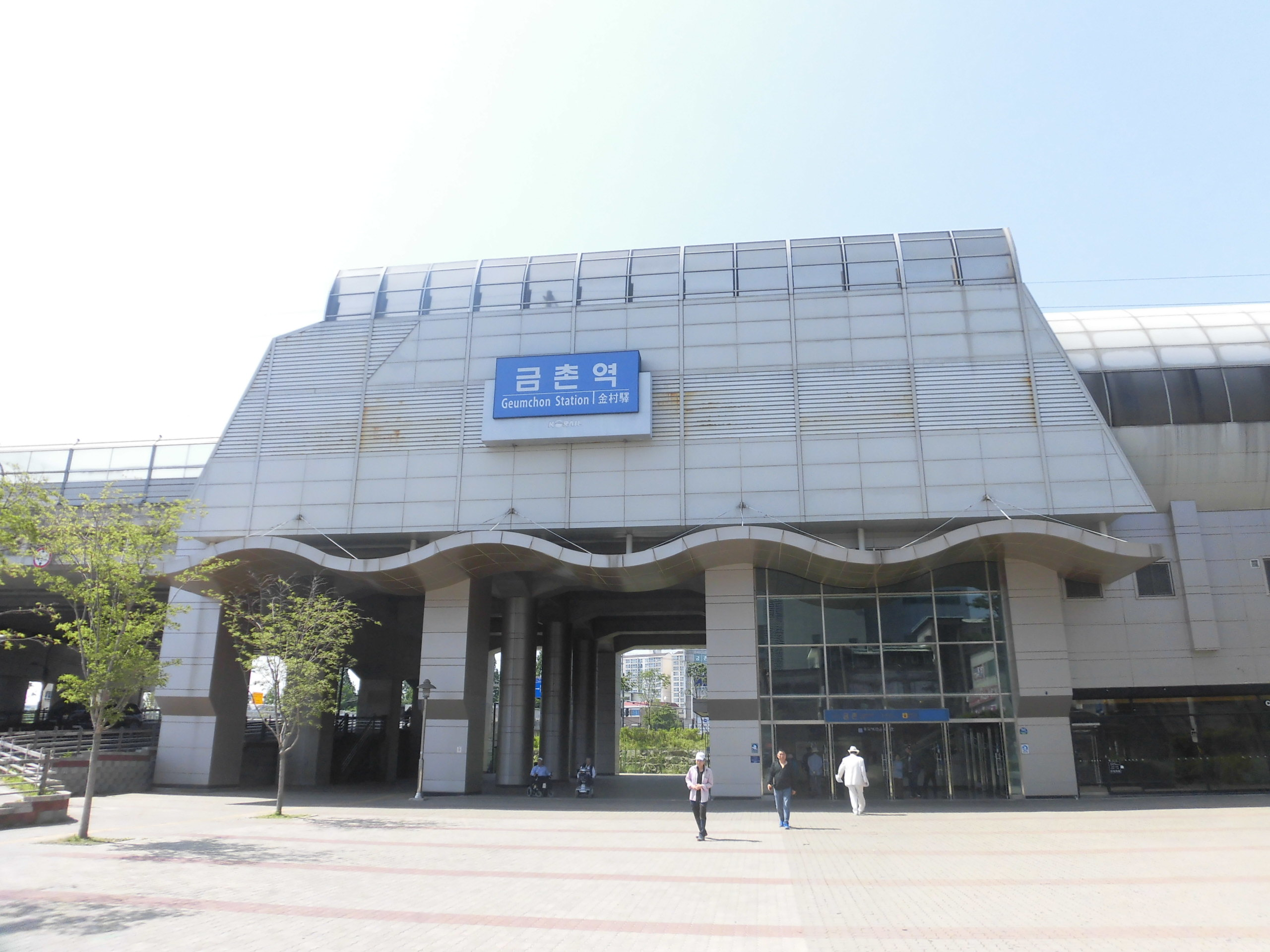 경의선 금촌역